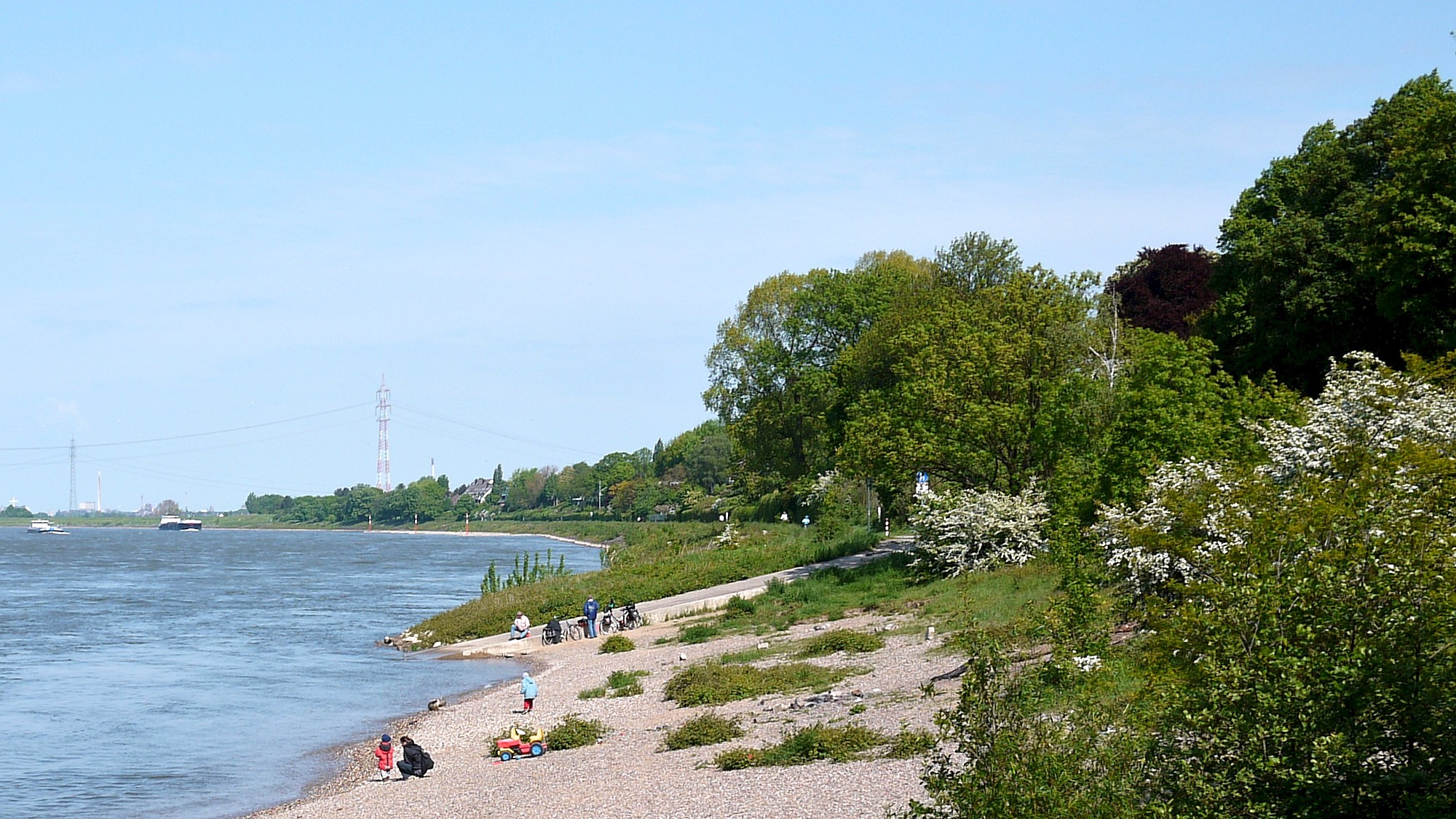 Düsseldorf-Bockum, Rheinufer, hinten 380-kV-Rhein-Freileitungskreuzung (Bl. 4123) in Duisburg